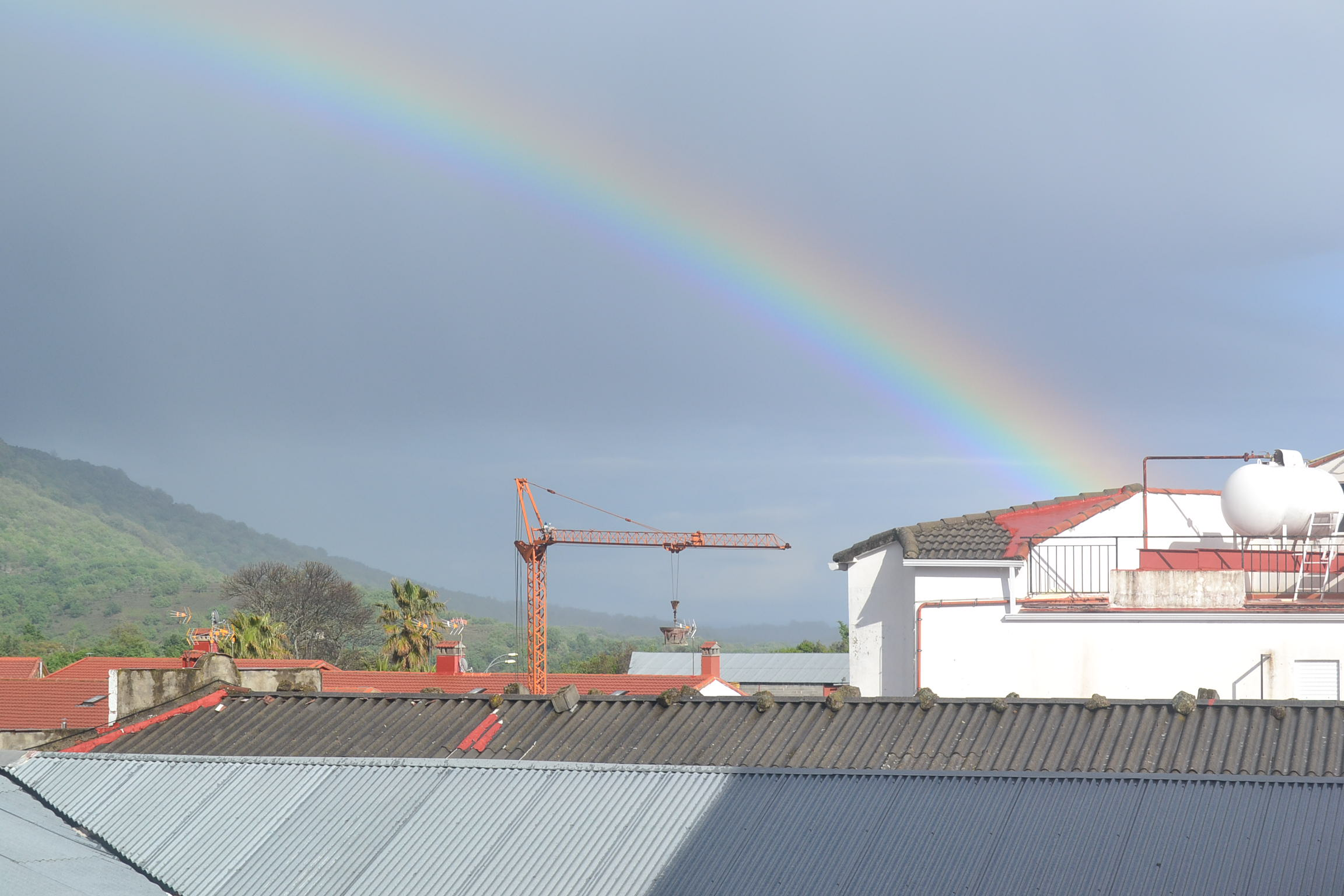 Arco Iris sobre Losar de la Vera. Abril de 2012